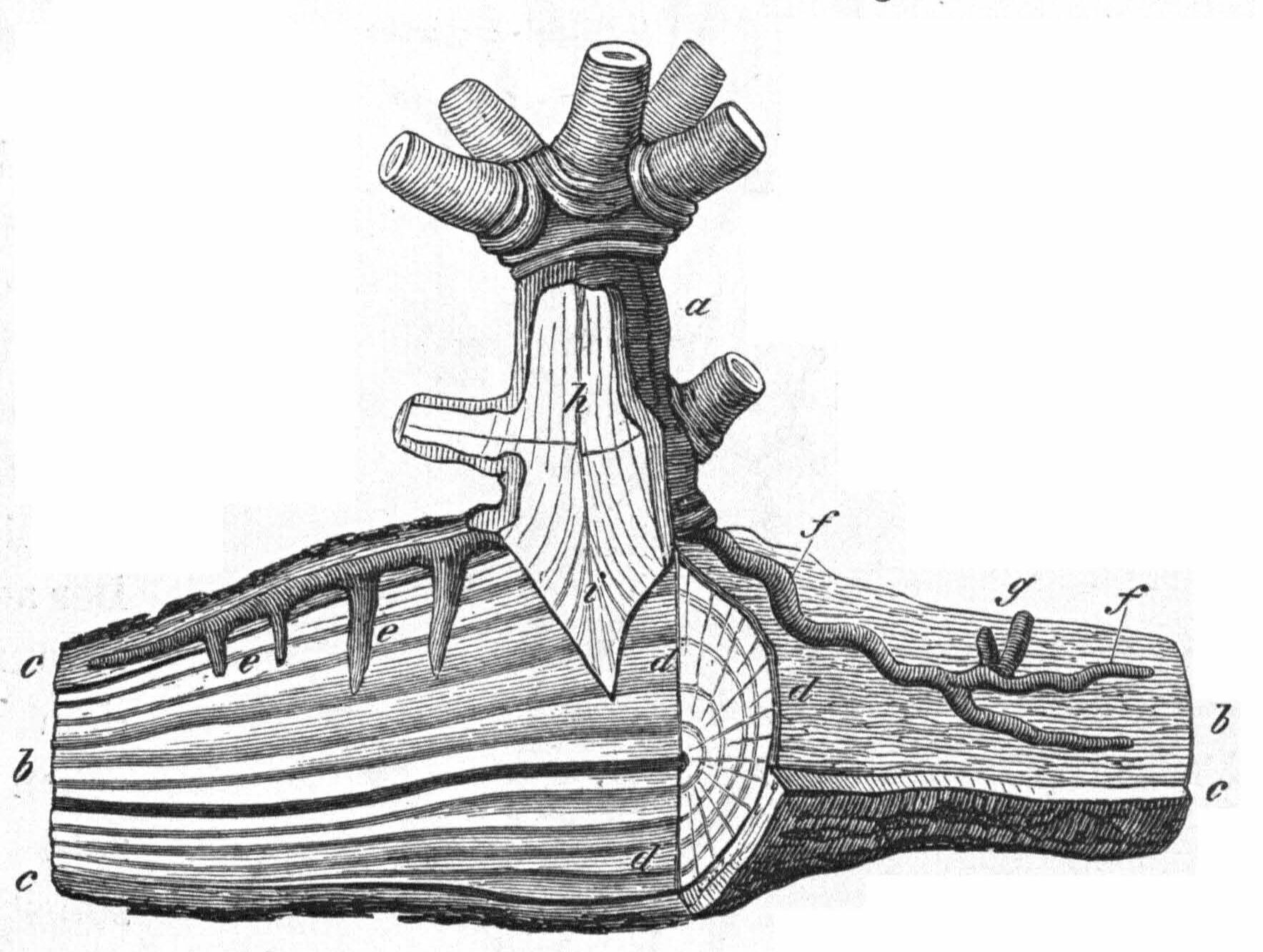 Haustorium von Viscum album. a = unterer Teil des Stammes der Mistel; h = Holz der Mistel, i = Hauptwurzel der Mistel; f = Wurzeln der Mistel, die in der Rinde (c) des Baumastes wachsen; g = Knospen der Mistel; e = Senker; bei d Halbquerschnitt durch das Holz (b) des Wirtes